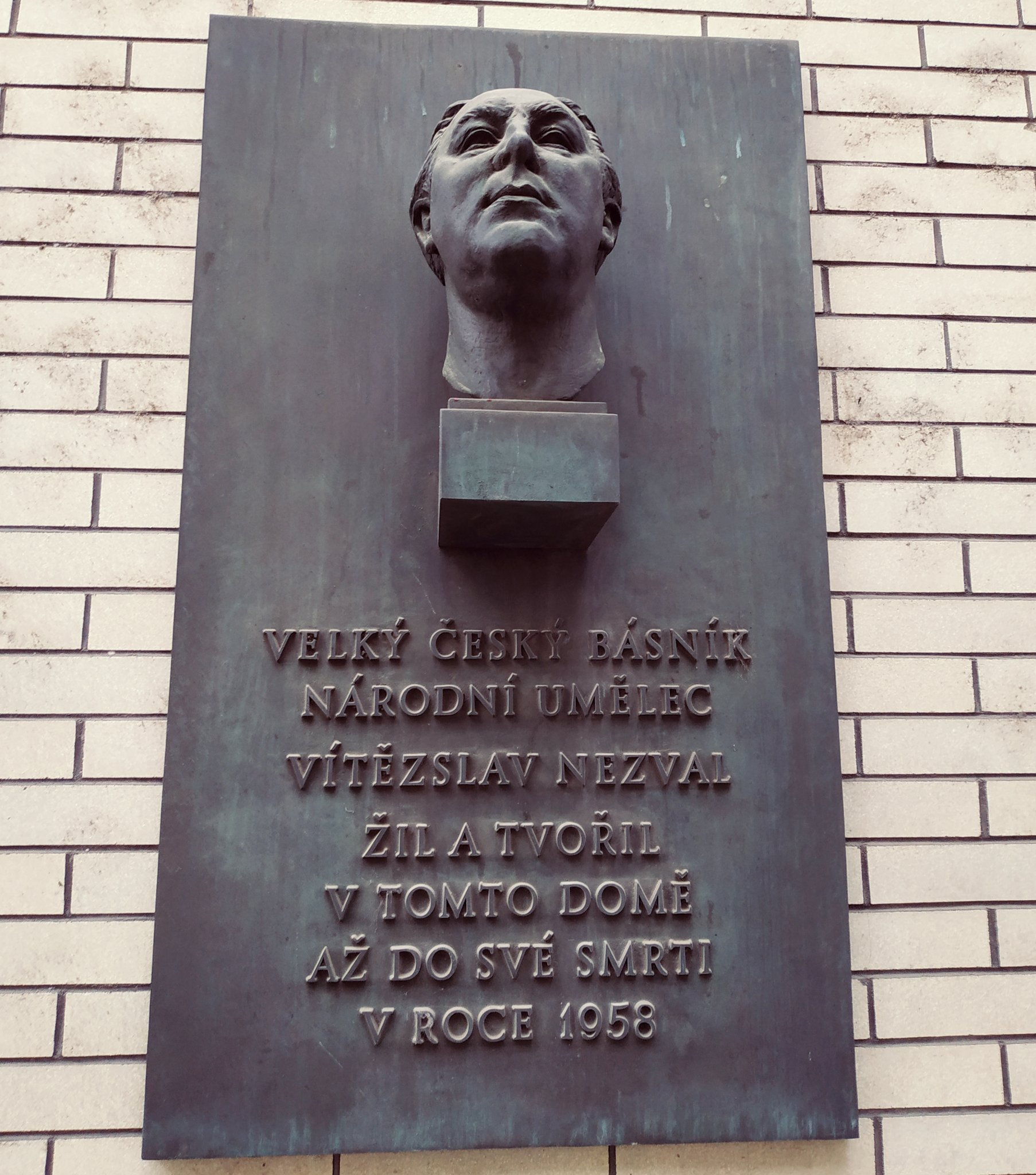 Pamětní deska na domu, kde roku 1958 zemřel, Baranova 1901/4, Praha